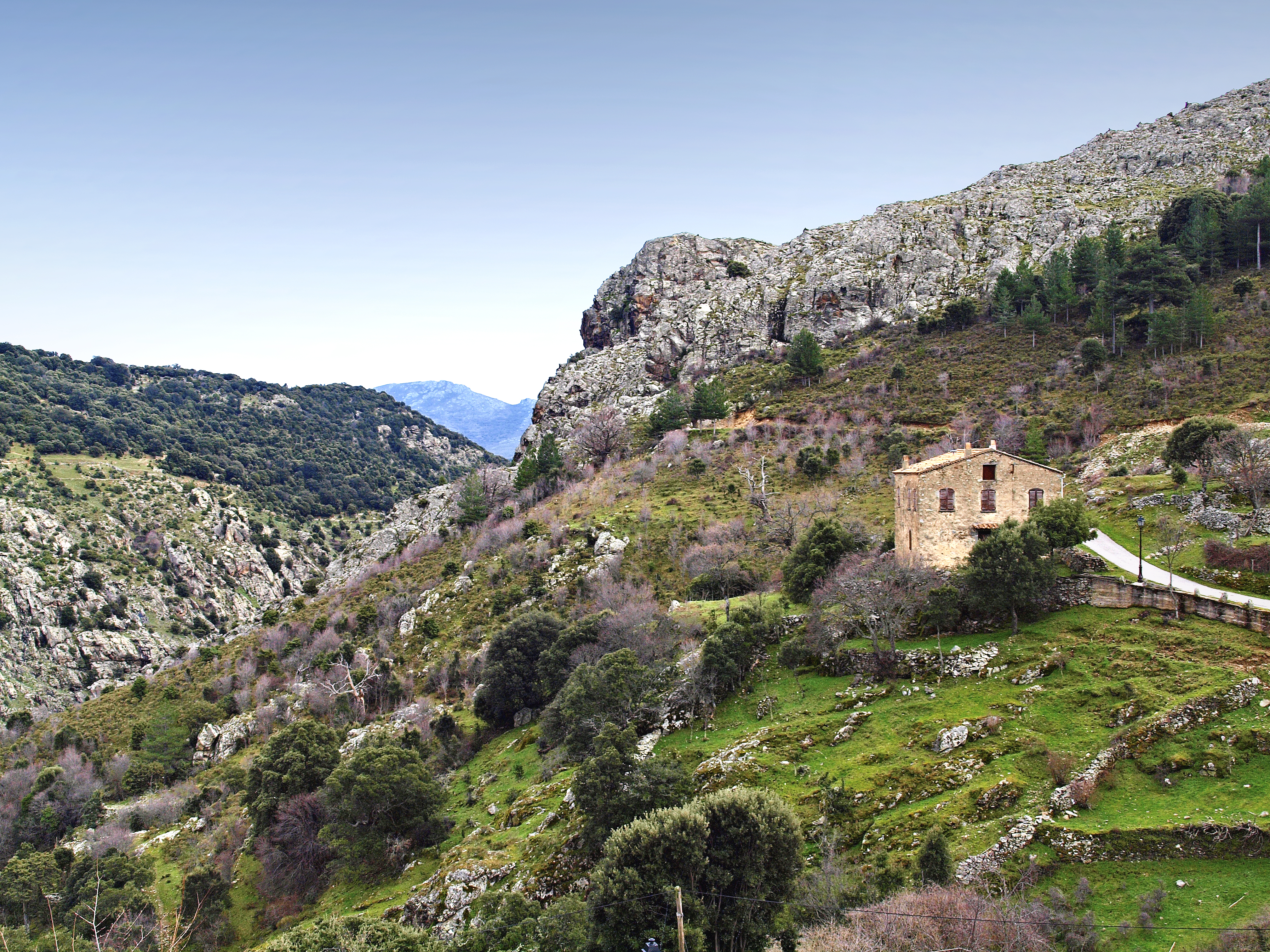 Mausoléo (Corsica) - Gorges du ruisseau de Francioni